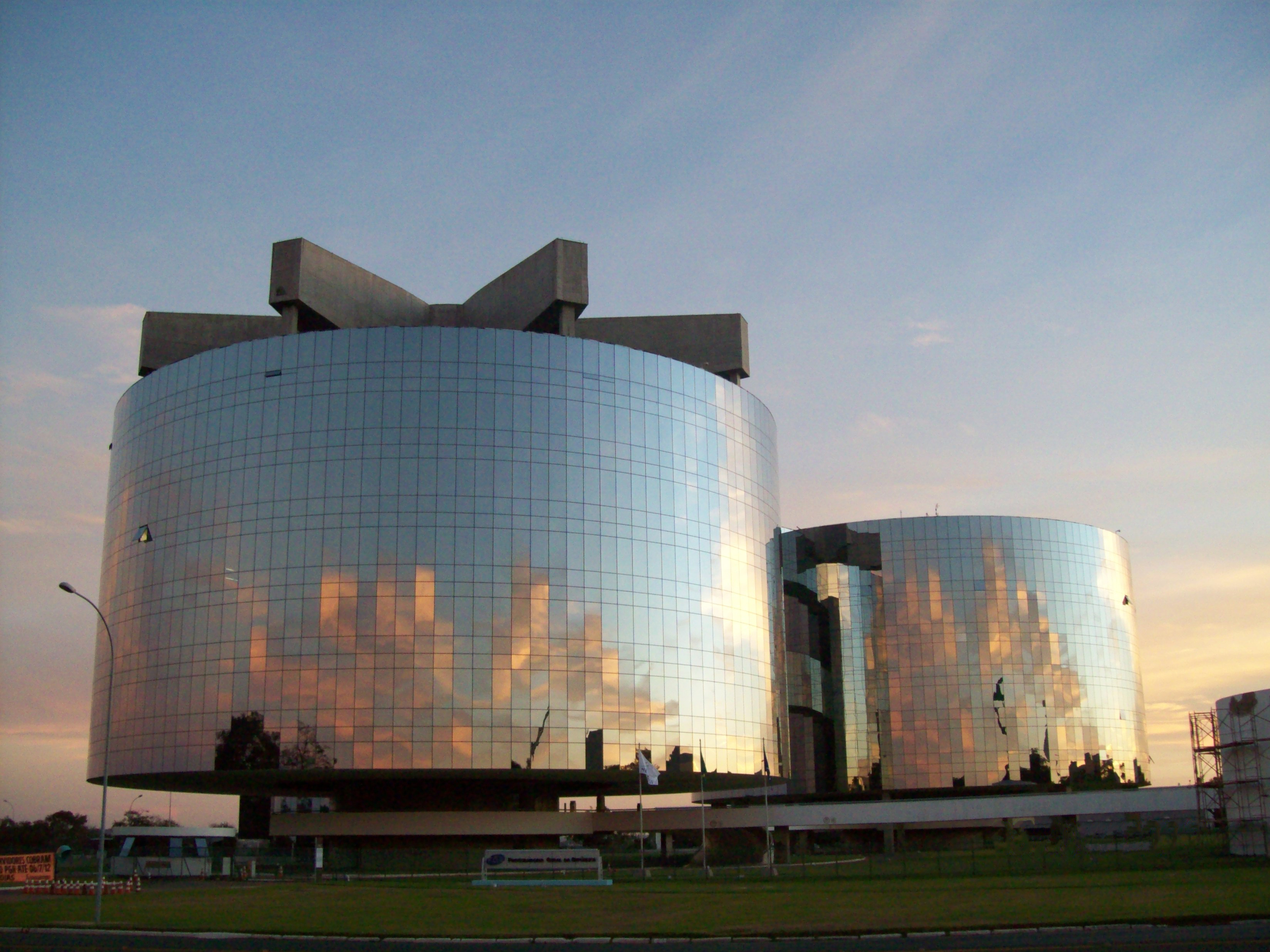 Brasilia DF Brasil - PGR - Procuradoria Geral da República